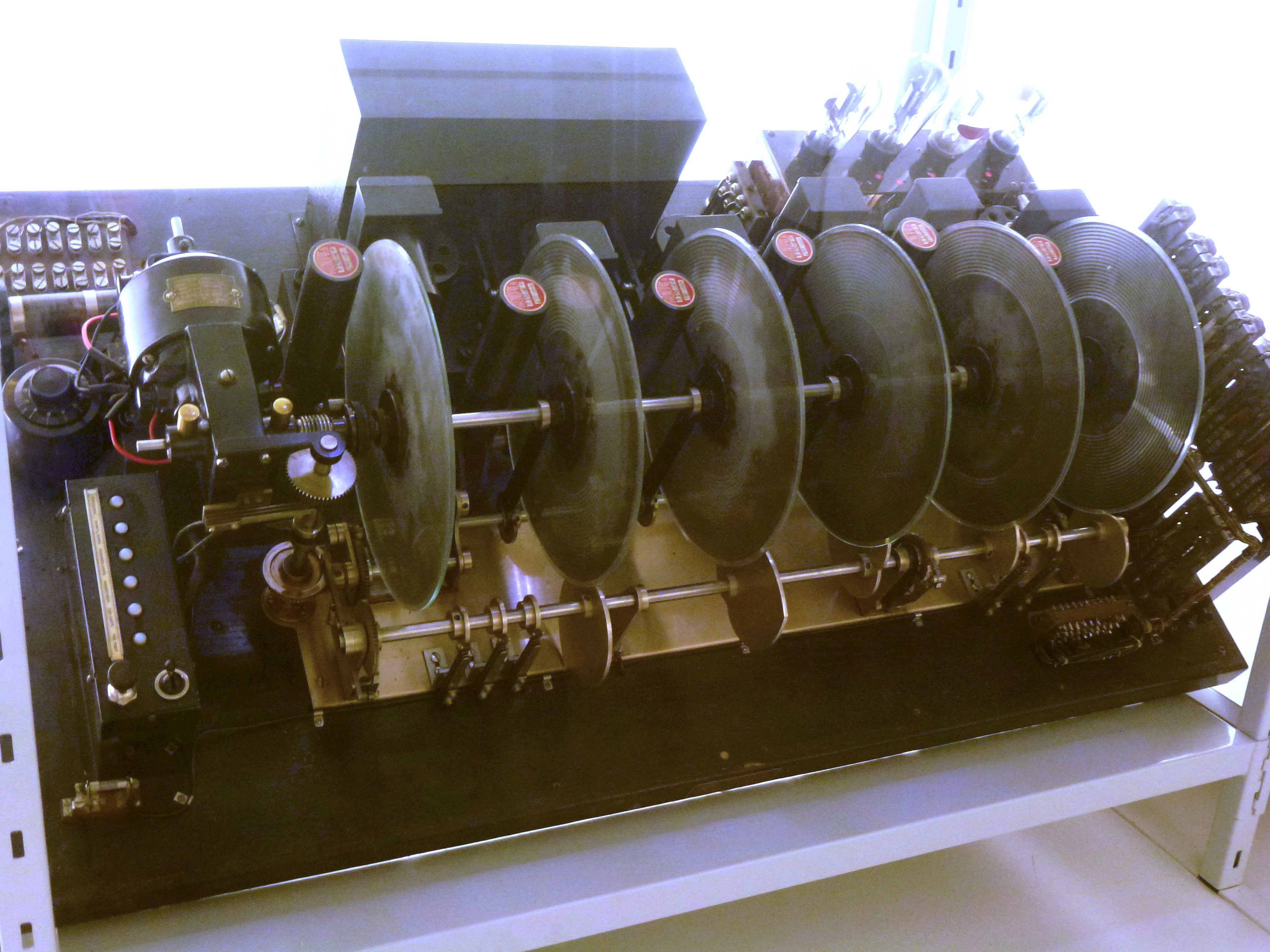 Talmaskin för "Fröken ur" från 1934 på Tekniska Museet, Stockholm